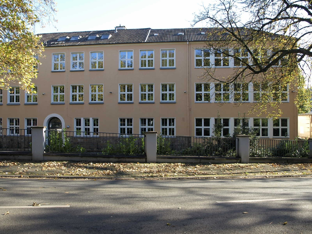 Grundschule Königshöher Weg 7 in Wuppertal. Gemeinschaftsschule und offene Ganztagsschule. Ansicht von der Straße Schwarzer Weg.